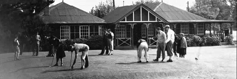 Club de golf del pueblo de Libertad, Merlo, Provincia de Buenos Aires.